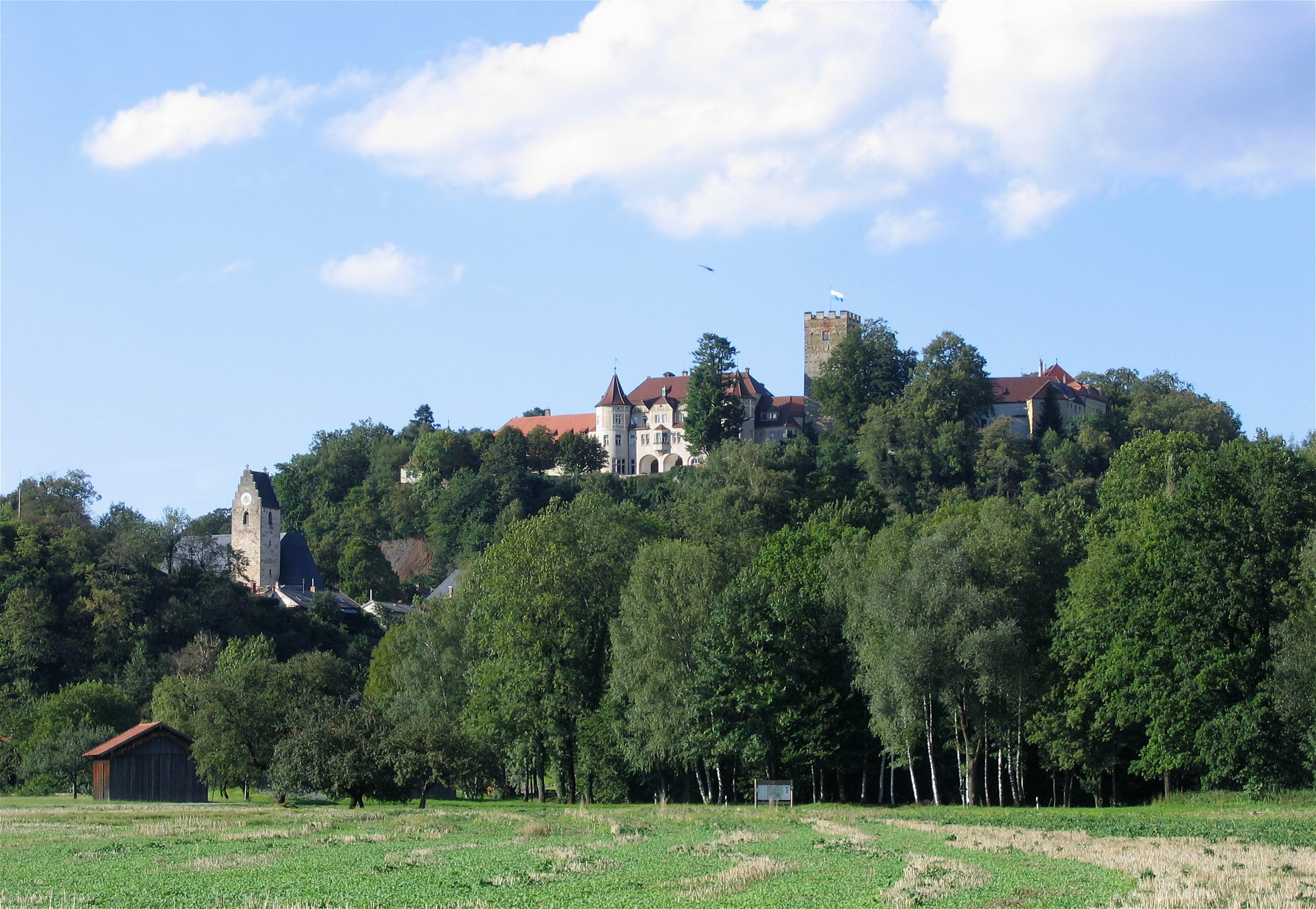 Neubeuern mit Schloss und Pfarrkirche, von Süden gesehen